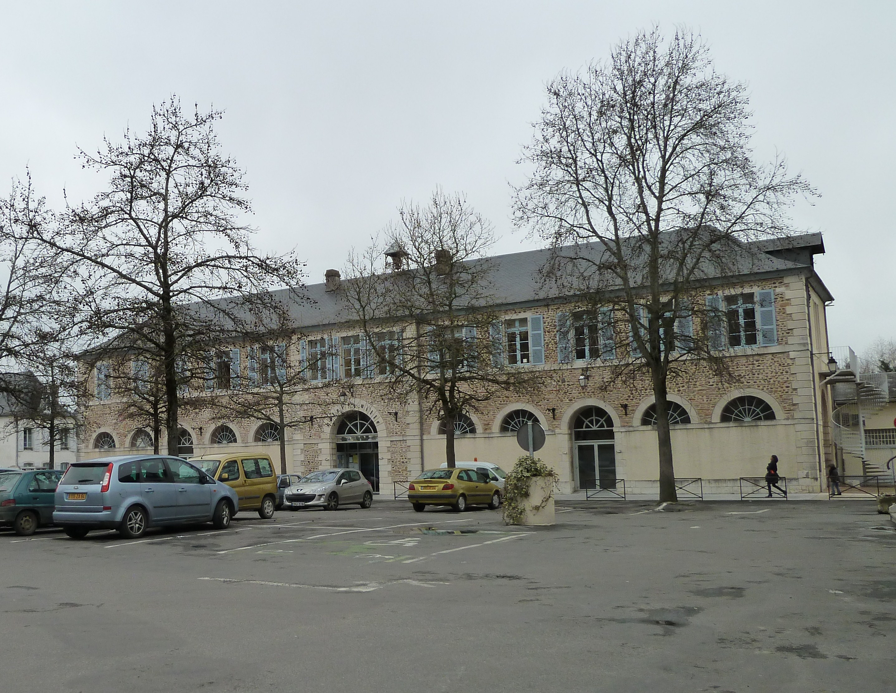 Mairie de Morlaàs